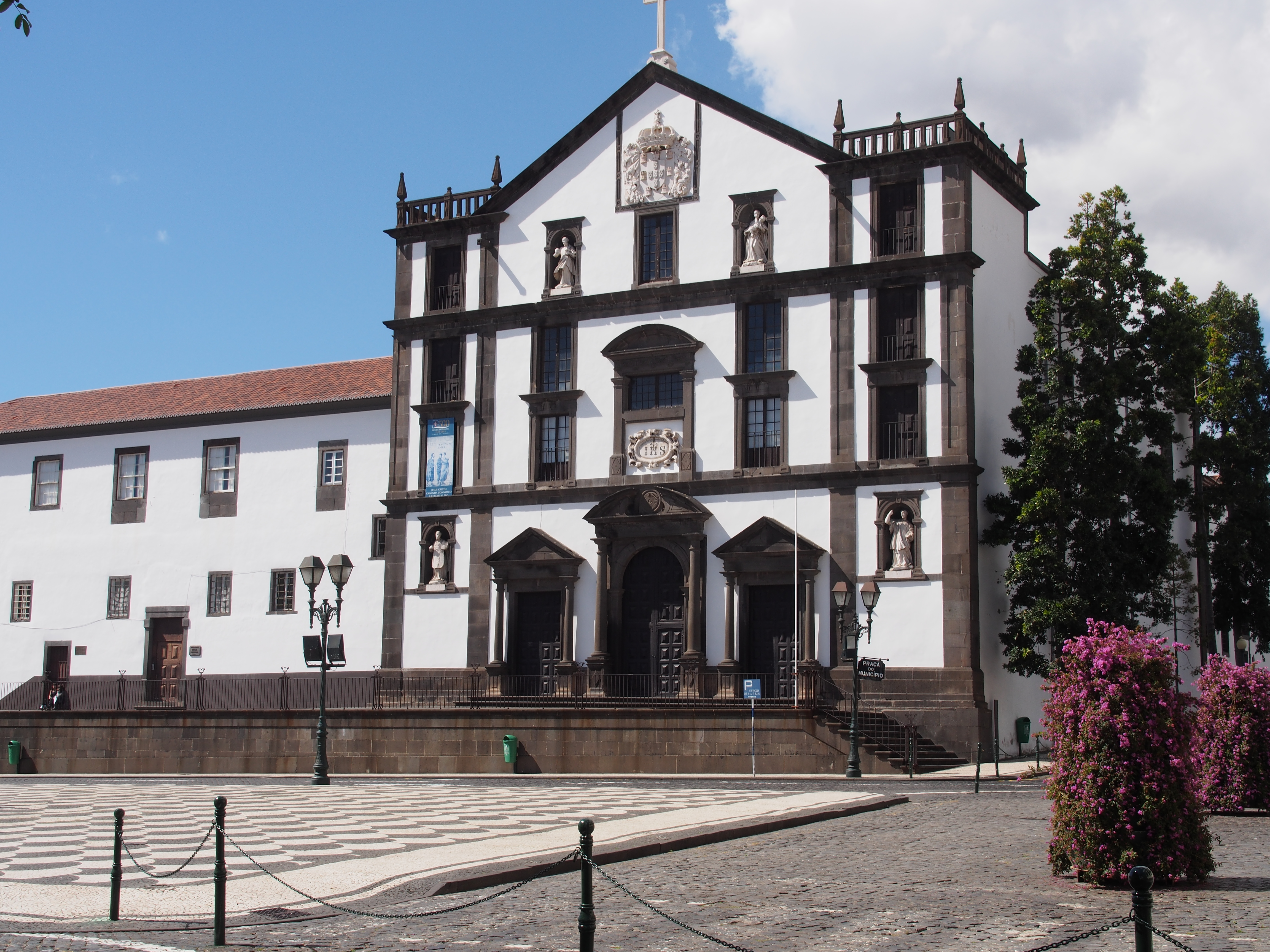 Jesuitenschule und Kirche Igreja do Colégio